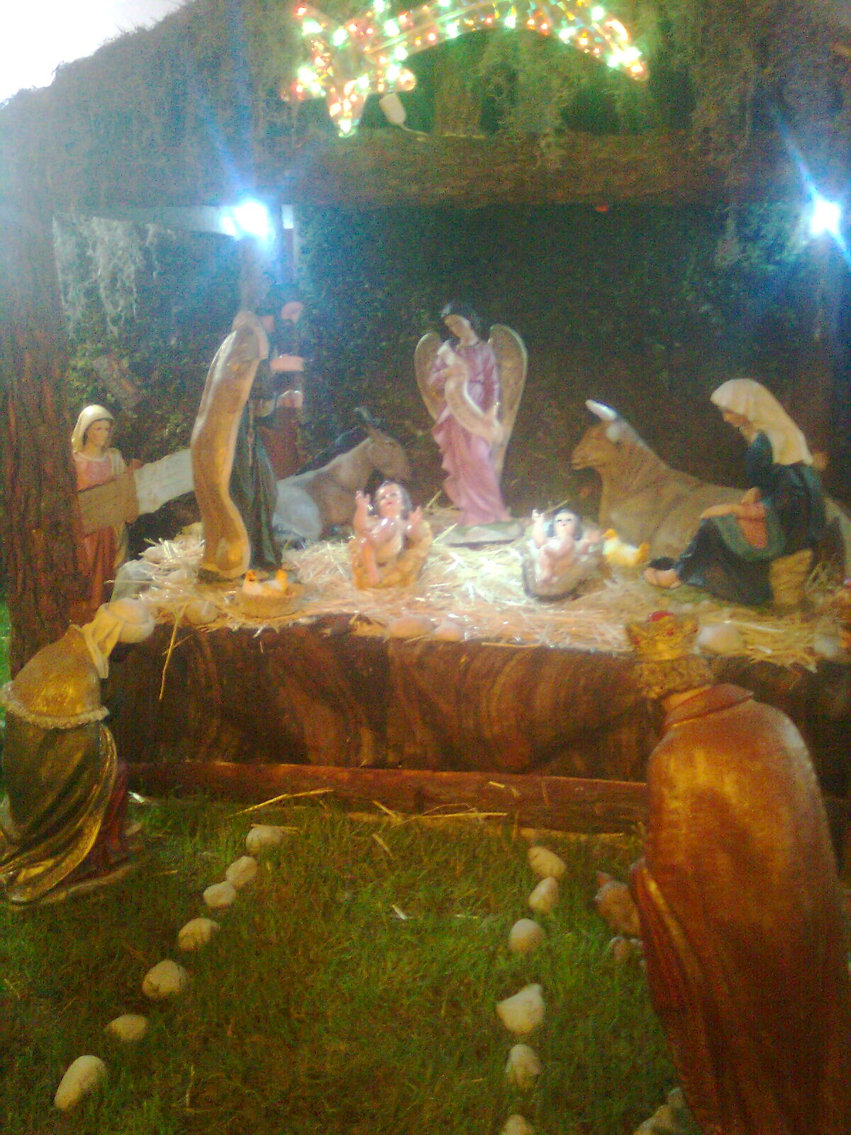 Nacimiento Tradicional En la Iglesia de San Juan Cuautlancingo.